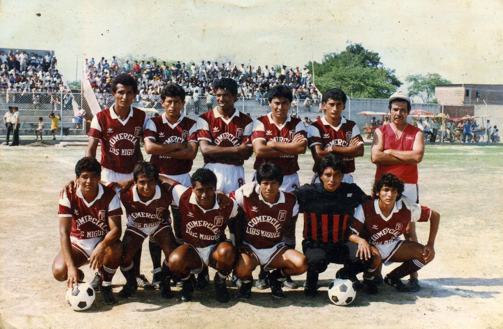 Deportivo Pacifico - Zarumilla vs Torino - Talara